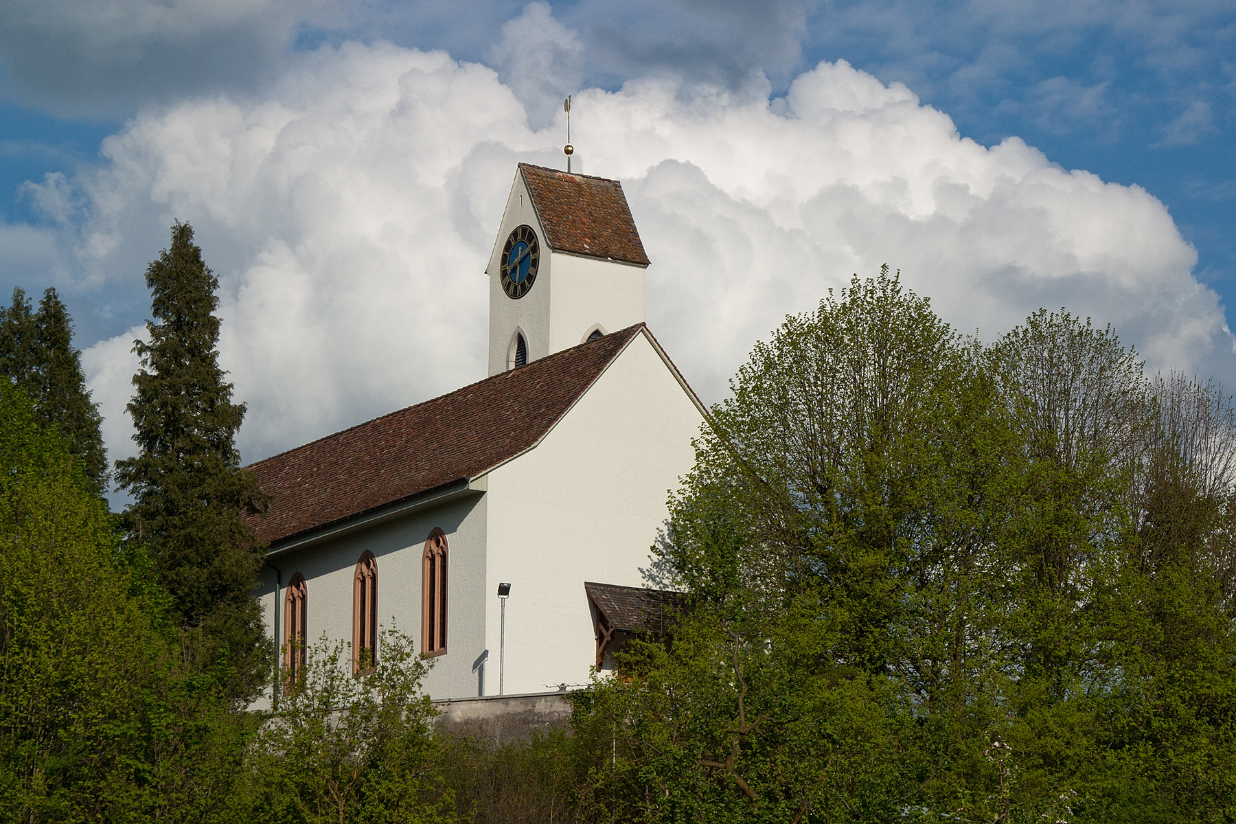 Evangelisch-Reformierte Kirche in Diegten (BL)